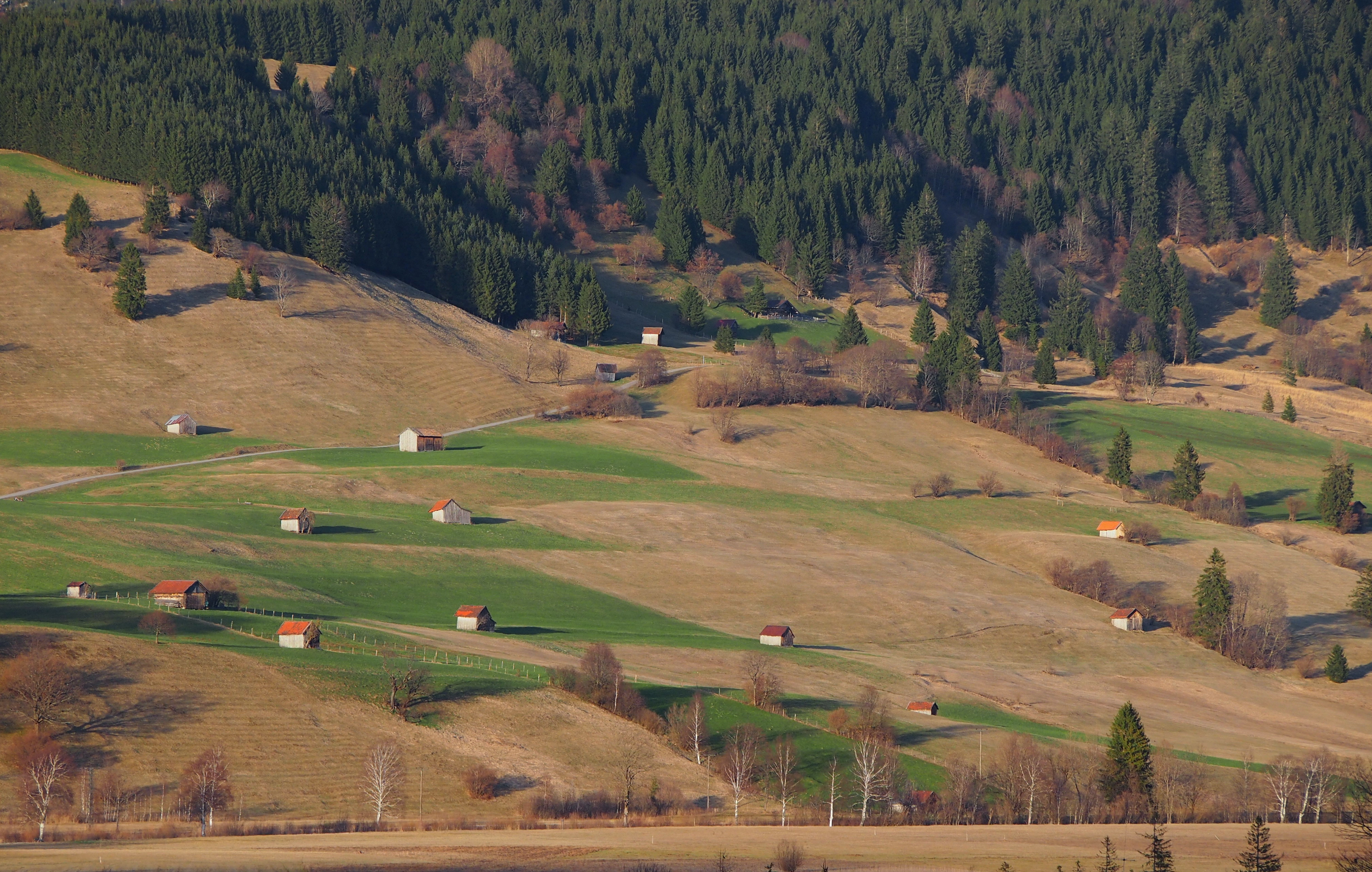 Heustadl am Grünbichl bei Unterammergau